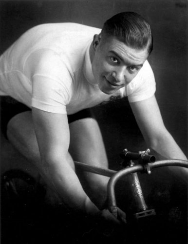 Wielrenner Jan Pijnenburg, tijdens zijn glansperiode in de jaren dertig. De populaire baanrenner Pijnenburg stond ook bekend als "Jan Kanonbal".